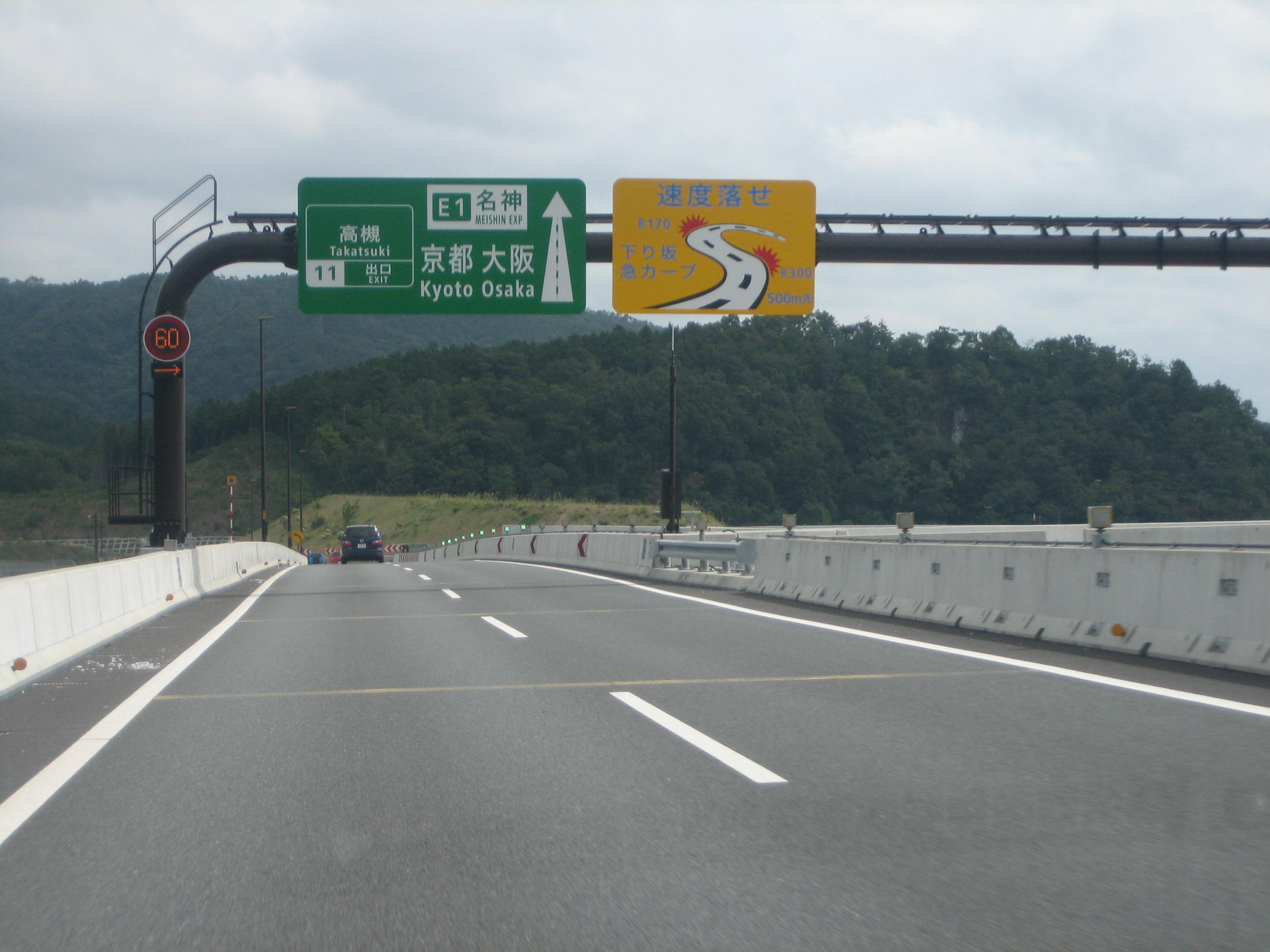 高槻第一ジャンクション